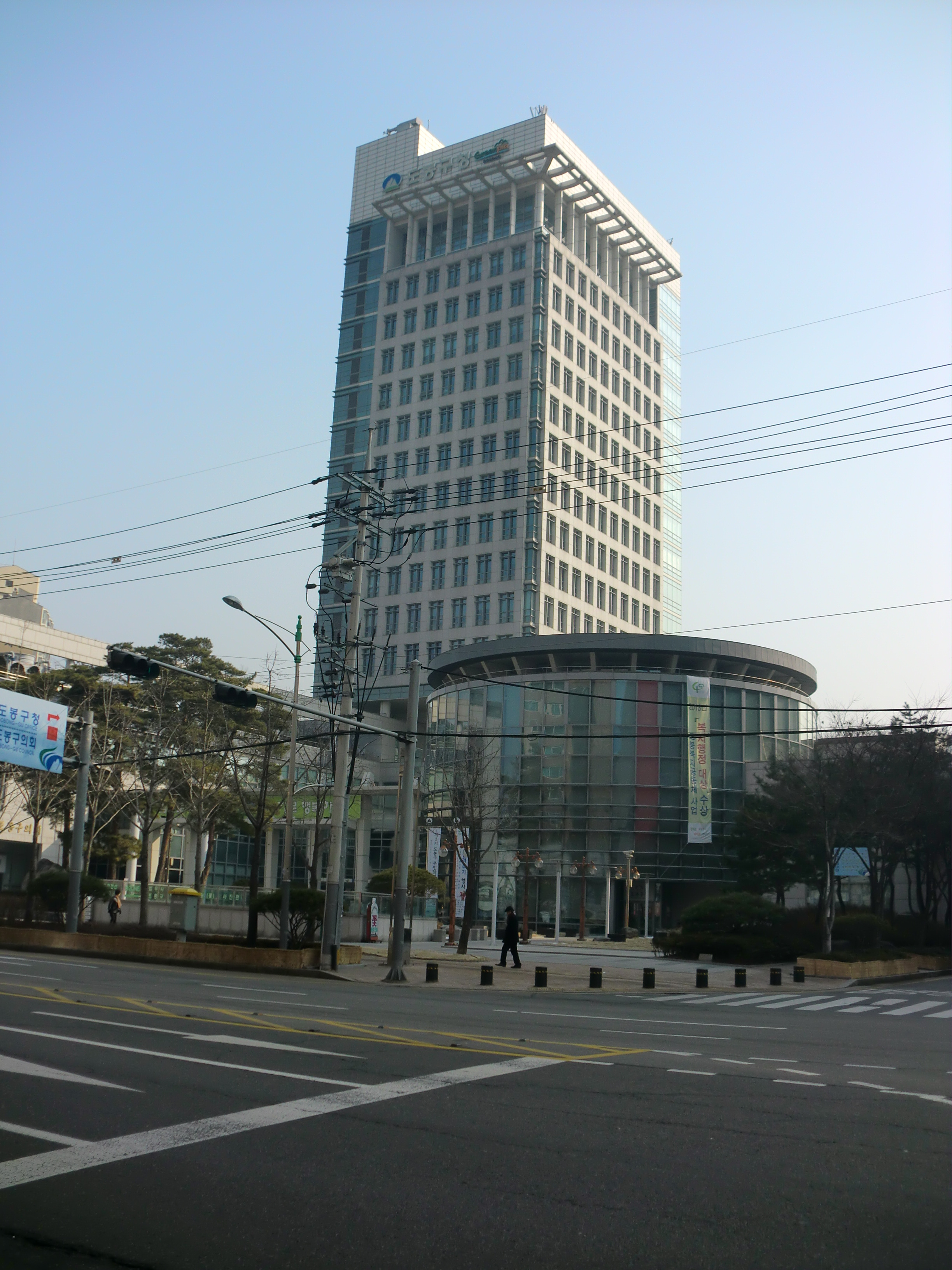 서울특별시 도봉구에 있는 도봉구청